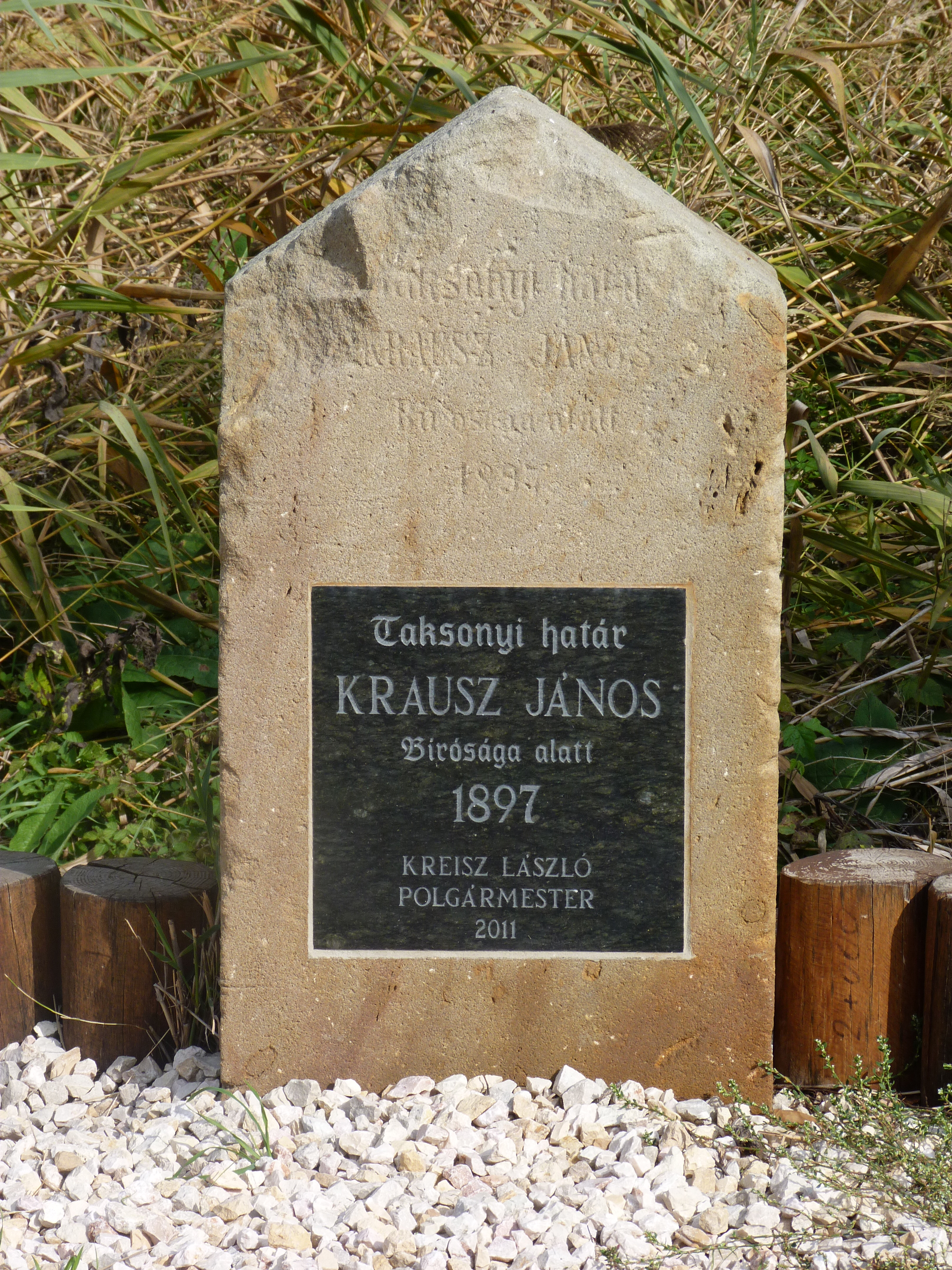 A felvétel 2013. október 14 -én készült Taksonyban. ©© Derzsi Elekes Andor, Budapest, 2013, You are authorised to use these photos and vids under Creative Commons – even for commercial, for profit purposes. Photos must be attributed to Derzsi Elekes Andor. All of the photos and vids in the Metapolisz DVD line are under Creative Commons and can be used even for commercial – for profit – purposes. Recommended Citation Derzsi Elekes Andor: Metapolisz DVD line